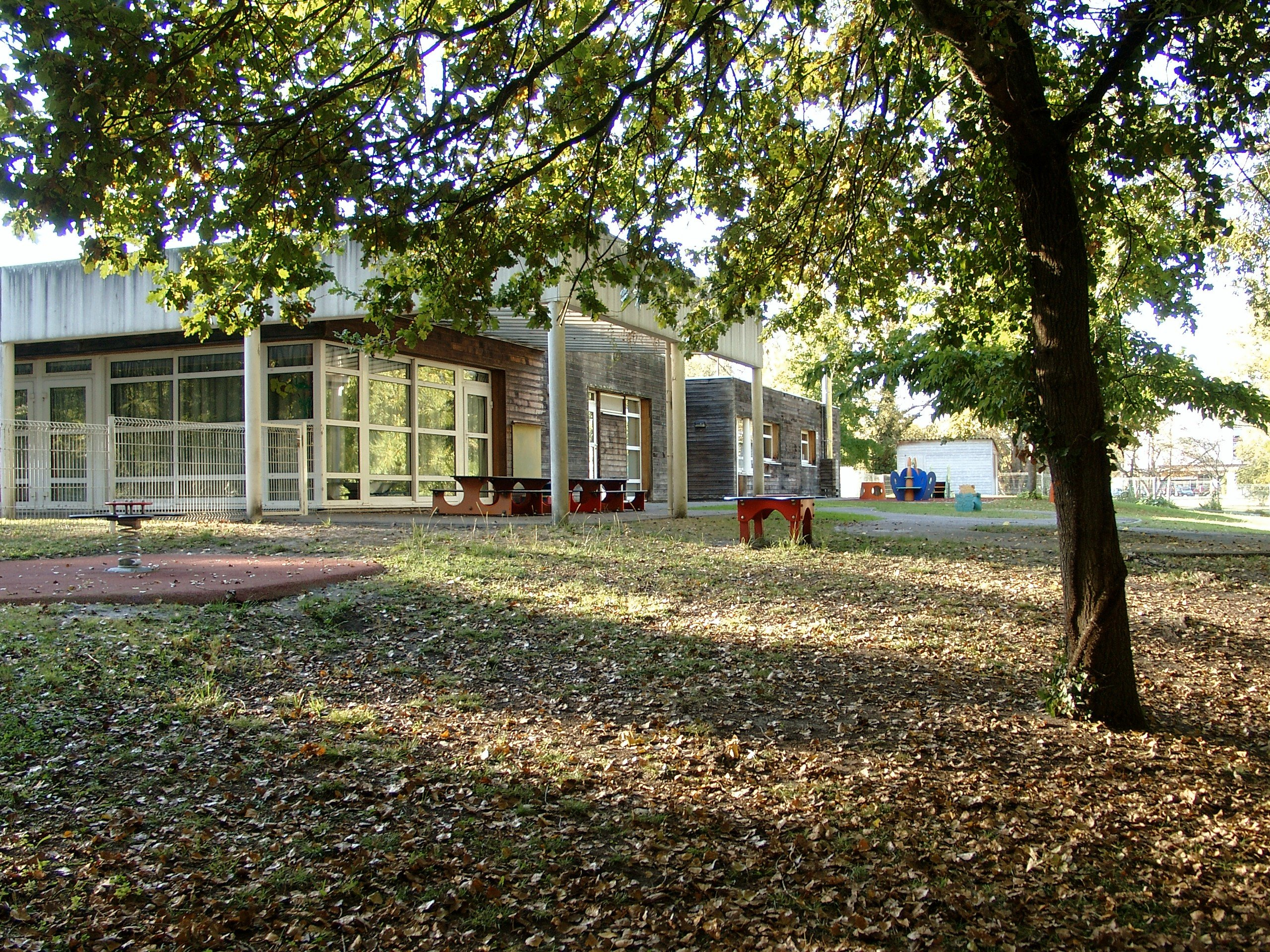 Crèche municipale de Mérignac (Gironde), familiale « la farandole » et multi-accueil « croqu'île ».